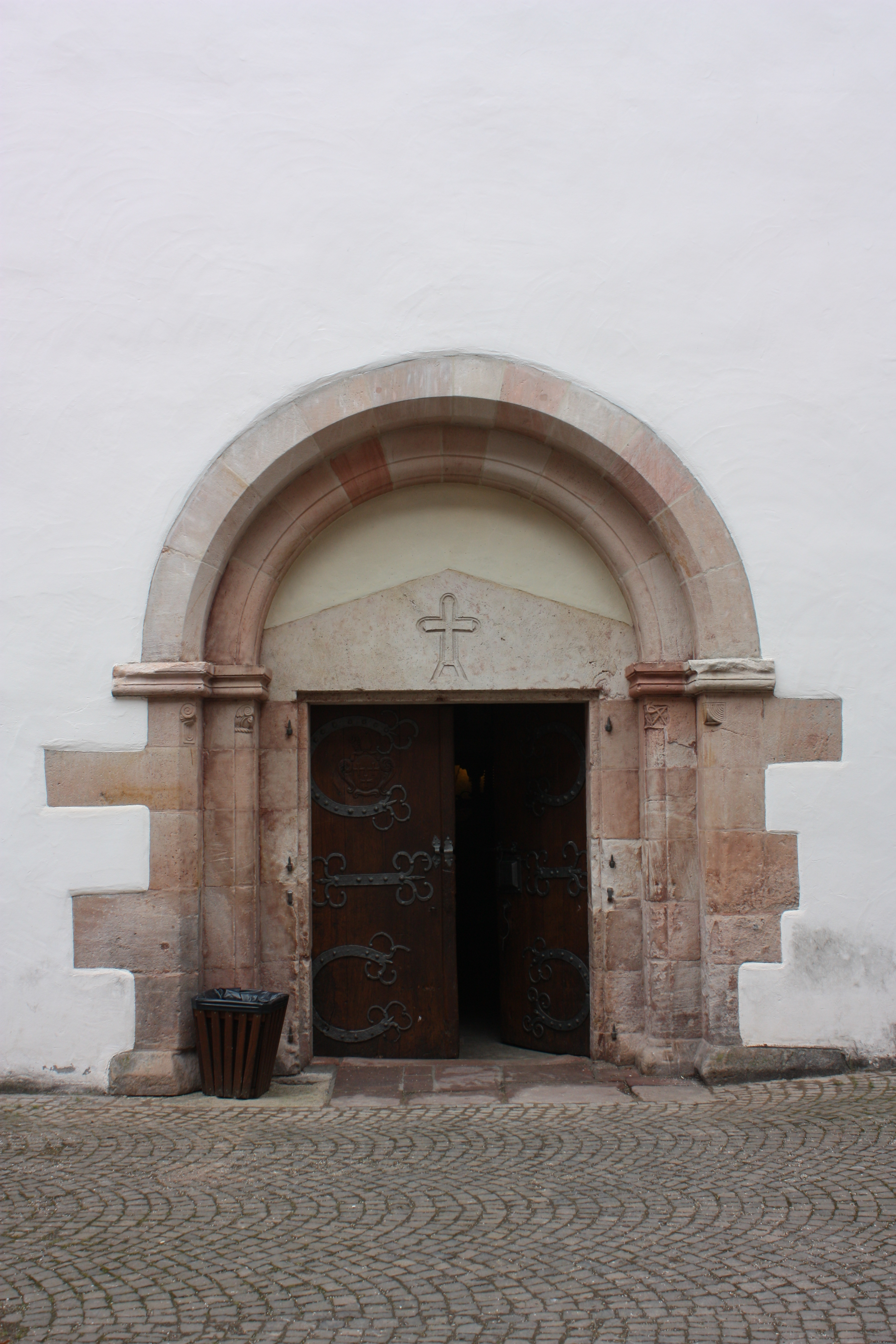 Offene Tür zum Laienrefektorium des Klosters Eberbach